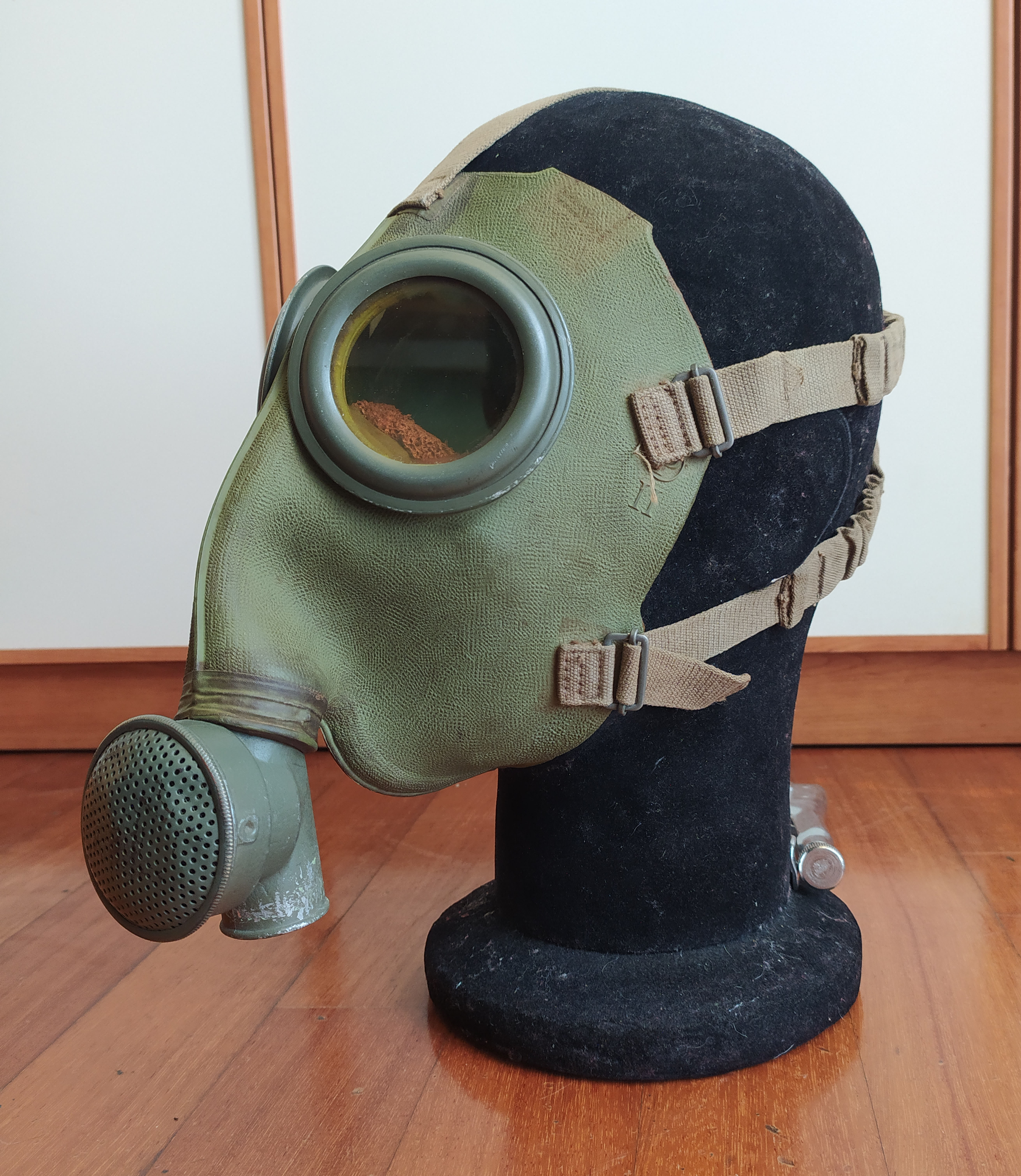 maschera penna vista dal lato